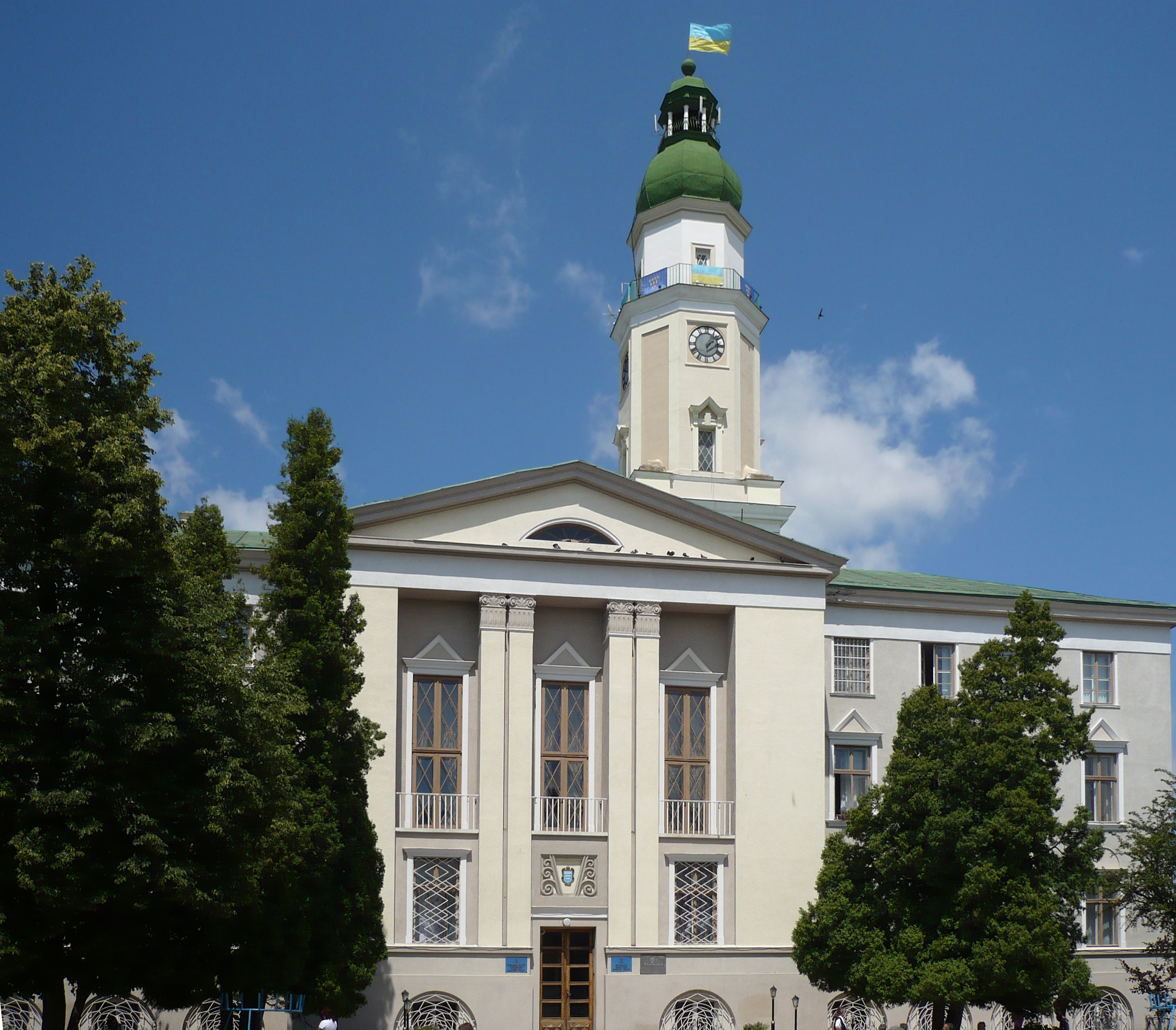 Ratusz